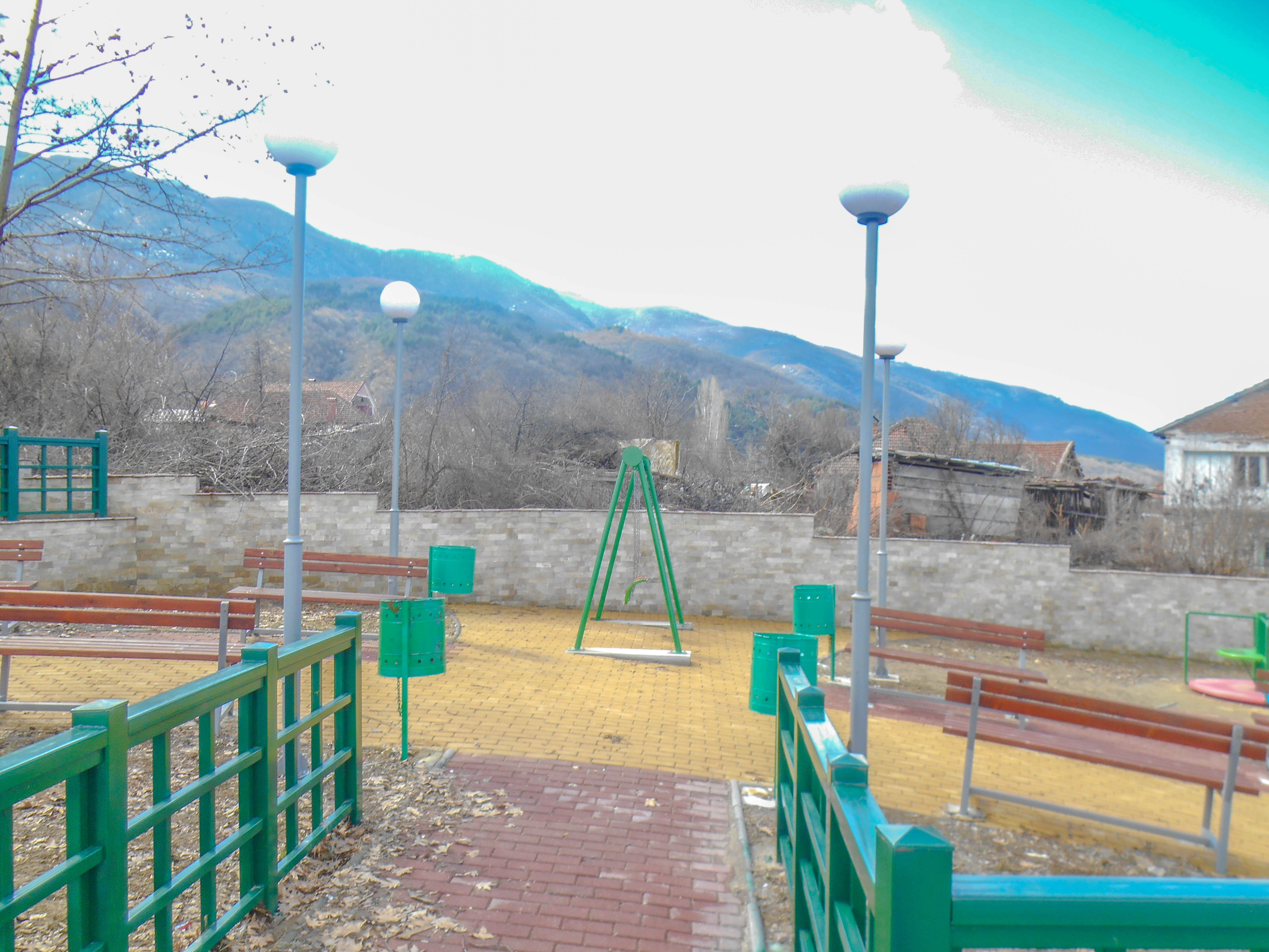 Борисово, Општина Ново Село